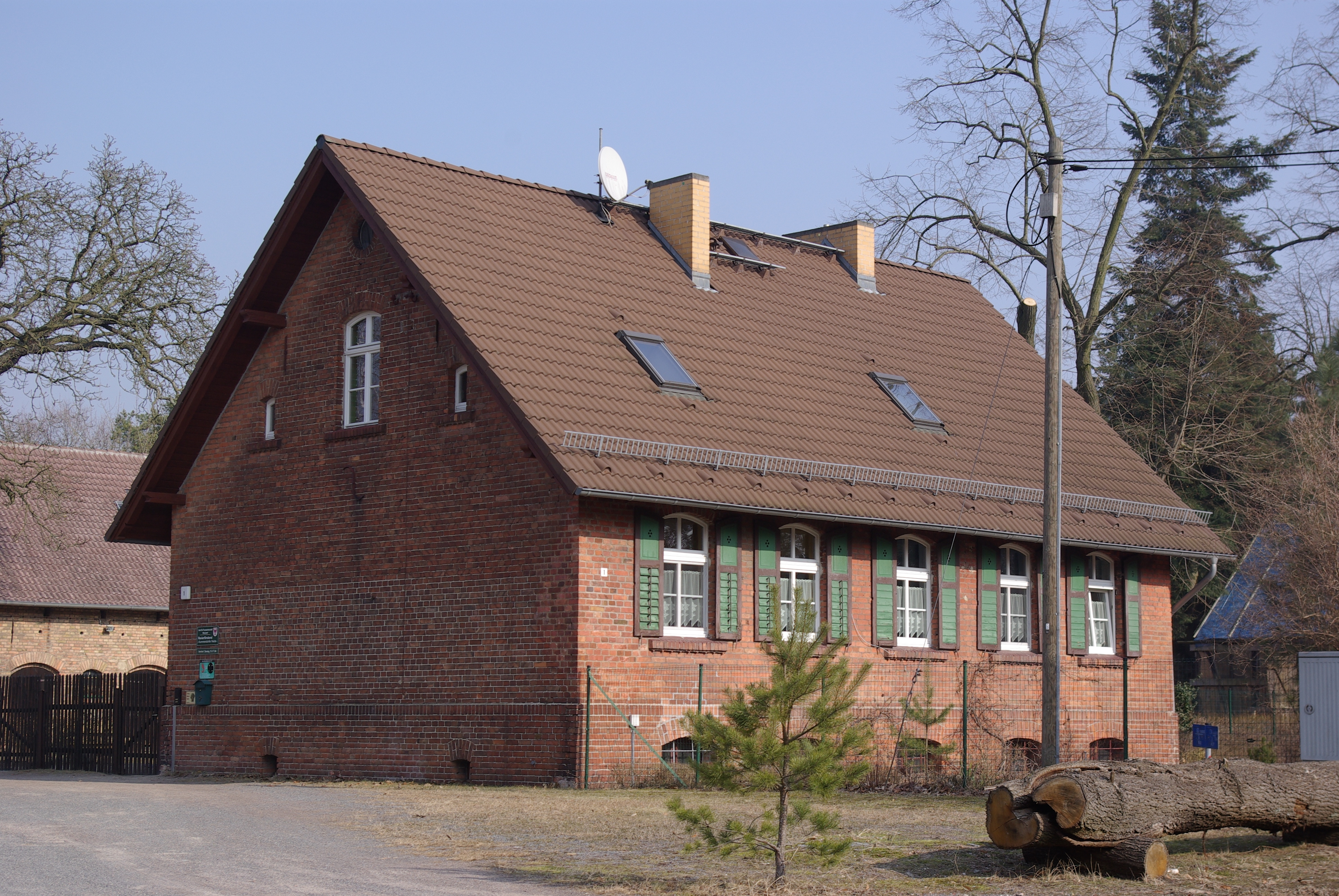 Am Mellensee in Brandenburg. Das Haus ist eine Försterei und steht unter Denkmalschutz.